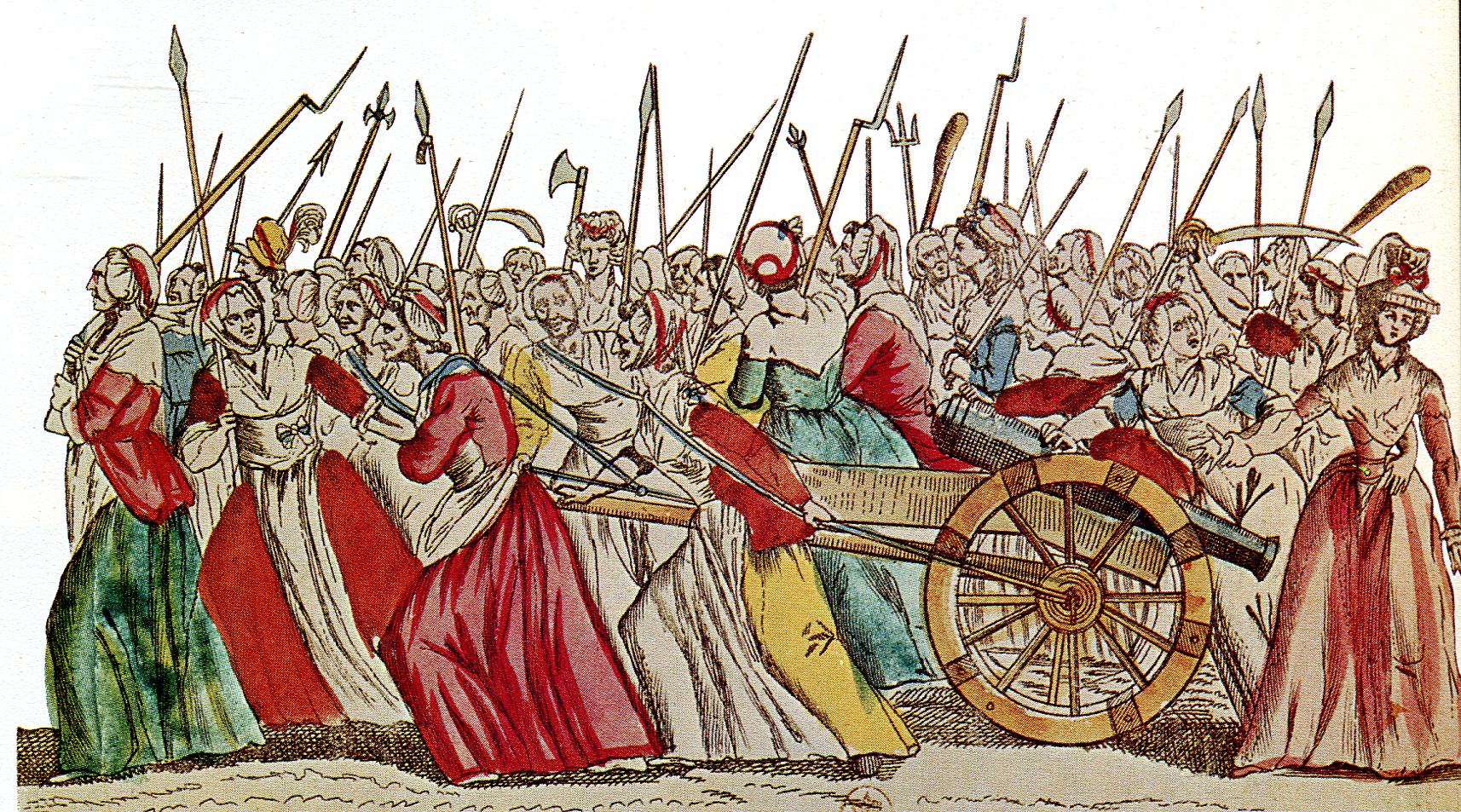 Женский марш на Версаль. 7.10.1789